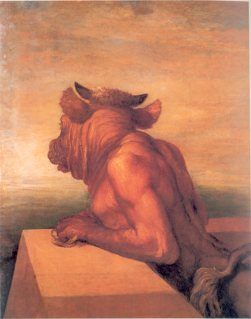 Una representación del Minotauro según la visión del autor de la obra George F. Watts (1877-86).